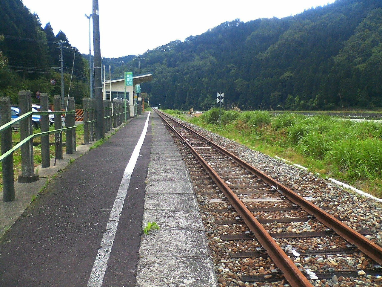 越美北線小和清水駅。2007年6月3日、福井県福井市小和清水町にてSuper Hatsukari撮影。